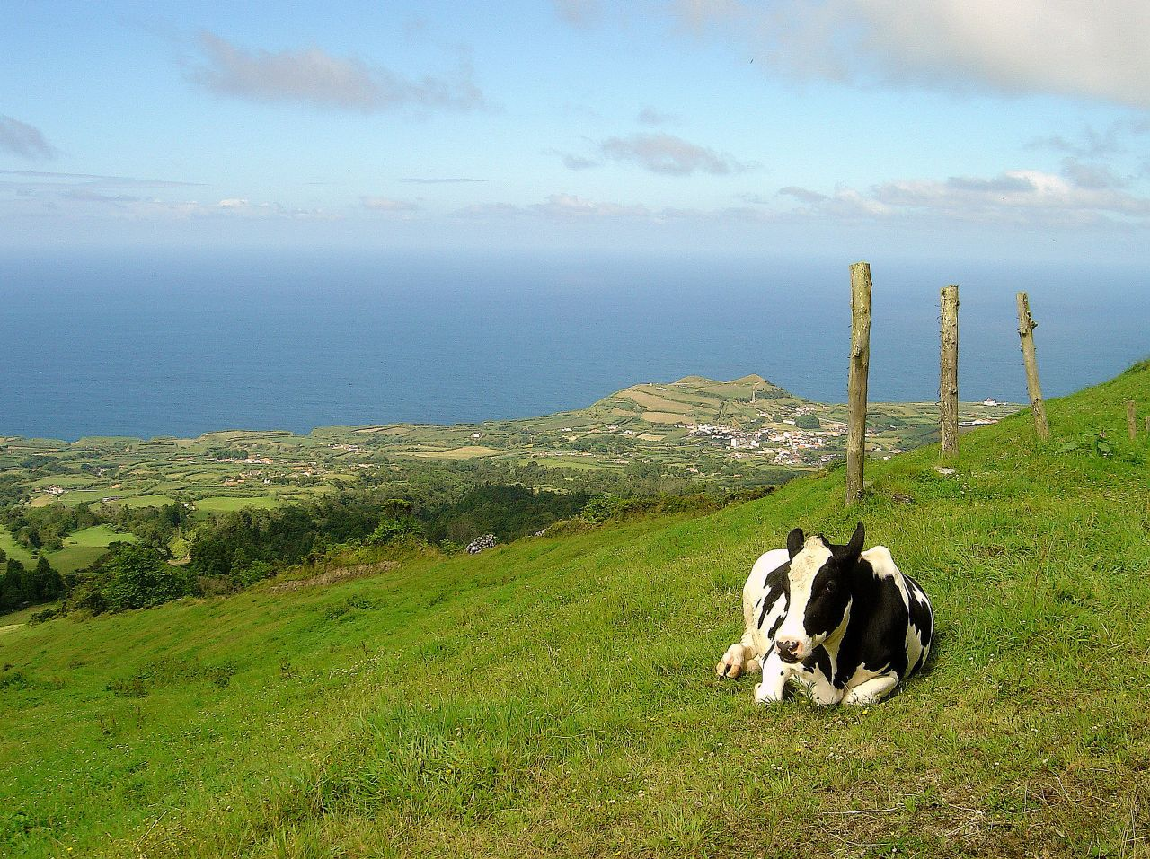 Ginetes visto do alto da Caldeira das Sete Cidades (Portugal), Ilha de S. Miguel